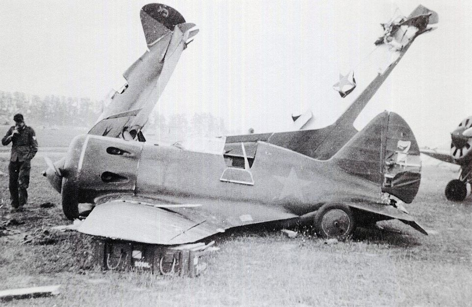 Беларуская (тарашкевіца): І-16 №3 на аэрадроме ў Пружанах..